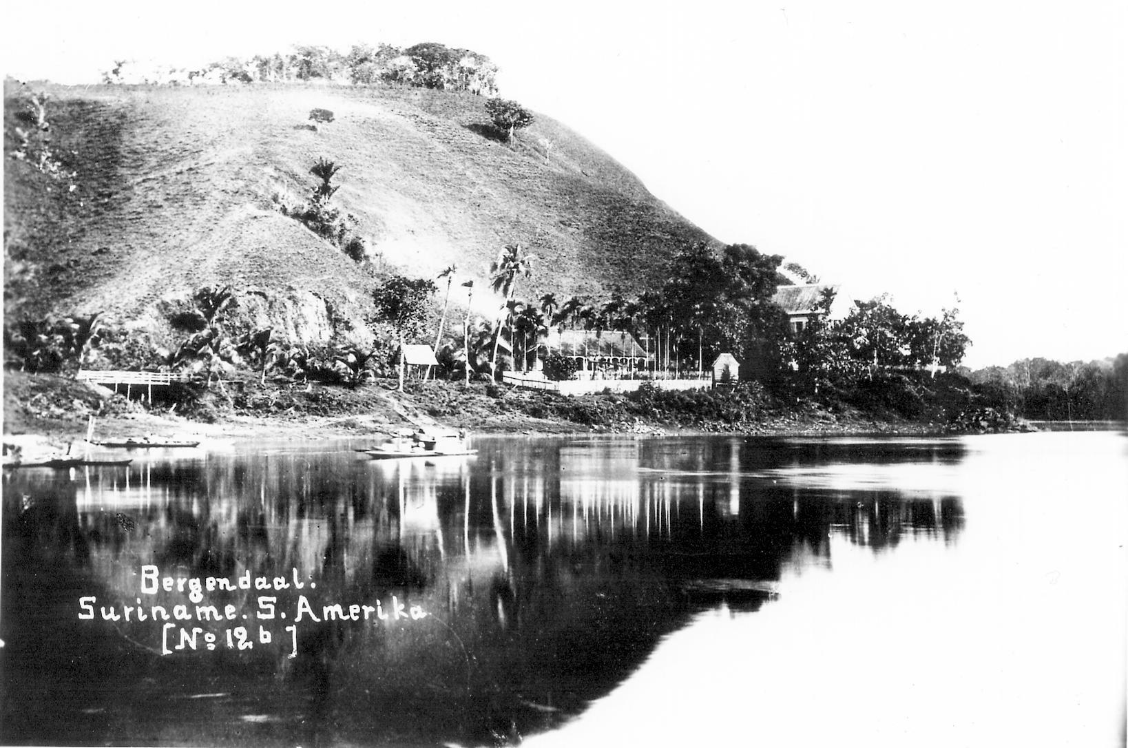 Foto Berg en Dal (Sranan: Bergi), een dorp en voormalige plantage in Suriname; ongeveer 100 km ten zuiden van Paramaribo in het noorden van het district Brokopondo aan de linker oever van de Suriname, aan de voet van de Blauwe Berg. uit 1880; eigen scan.